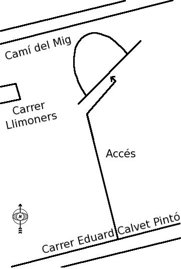 Situació del jaciment dels Forns romans de la Fornaca, a Vilassar de Dalt, el Maresme, (Catalunya).